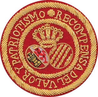 Réplica bordada a mano del Escudo honorífico de los Sitios de Zaragoza